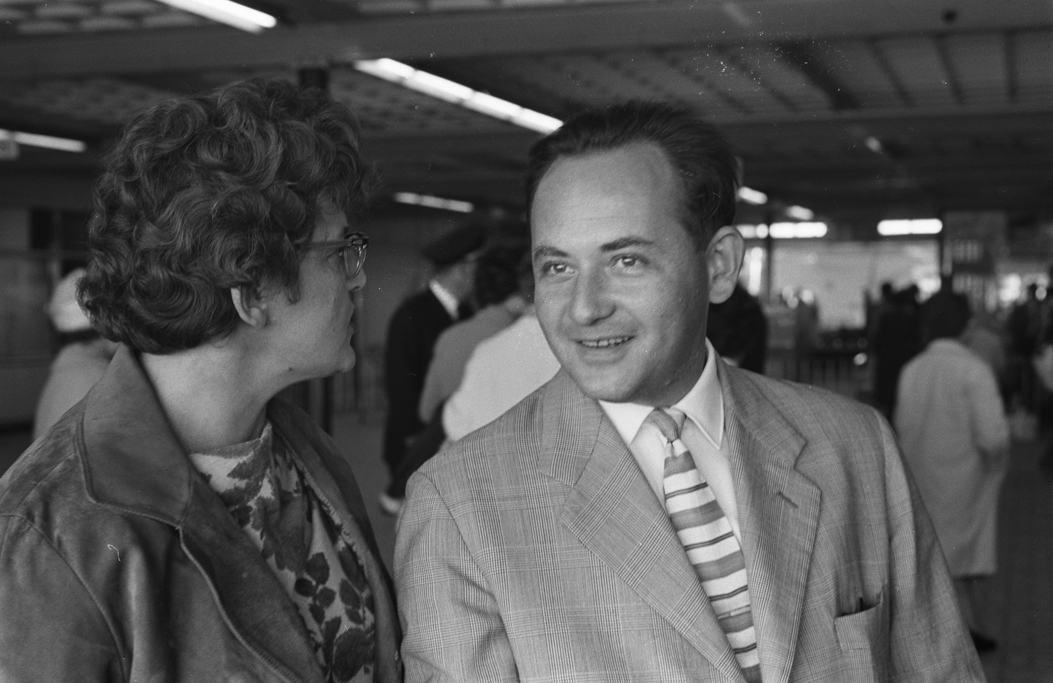 Collectie / Archief : Fotocollectie Anefo Reportage / Serie : [ onbekend ] Beschrijving : Russische violist Boris Gutnikow en echtgenote op Schiphol Datum : 13 augustus 1962 Locatie : Noord-Holland, Schiphol Trefwoorden : ECHTGENOTES, violisten Persoonsnaam : Boris Gutnikow Fotograaf : Pot, Harry / Anefo Auteursrechthebbende : Nationaal Archief Materiaalsoort : Negatief (zwart/wit) Nummer archiefinventaris : bekijk toegang 2.24.01.05 Bestanddeelnummer : 914-2035